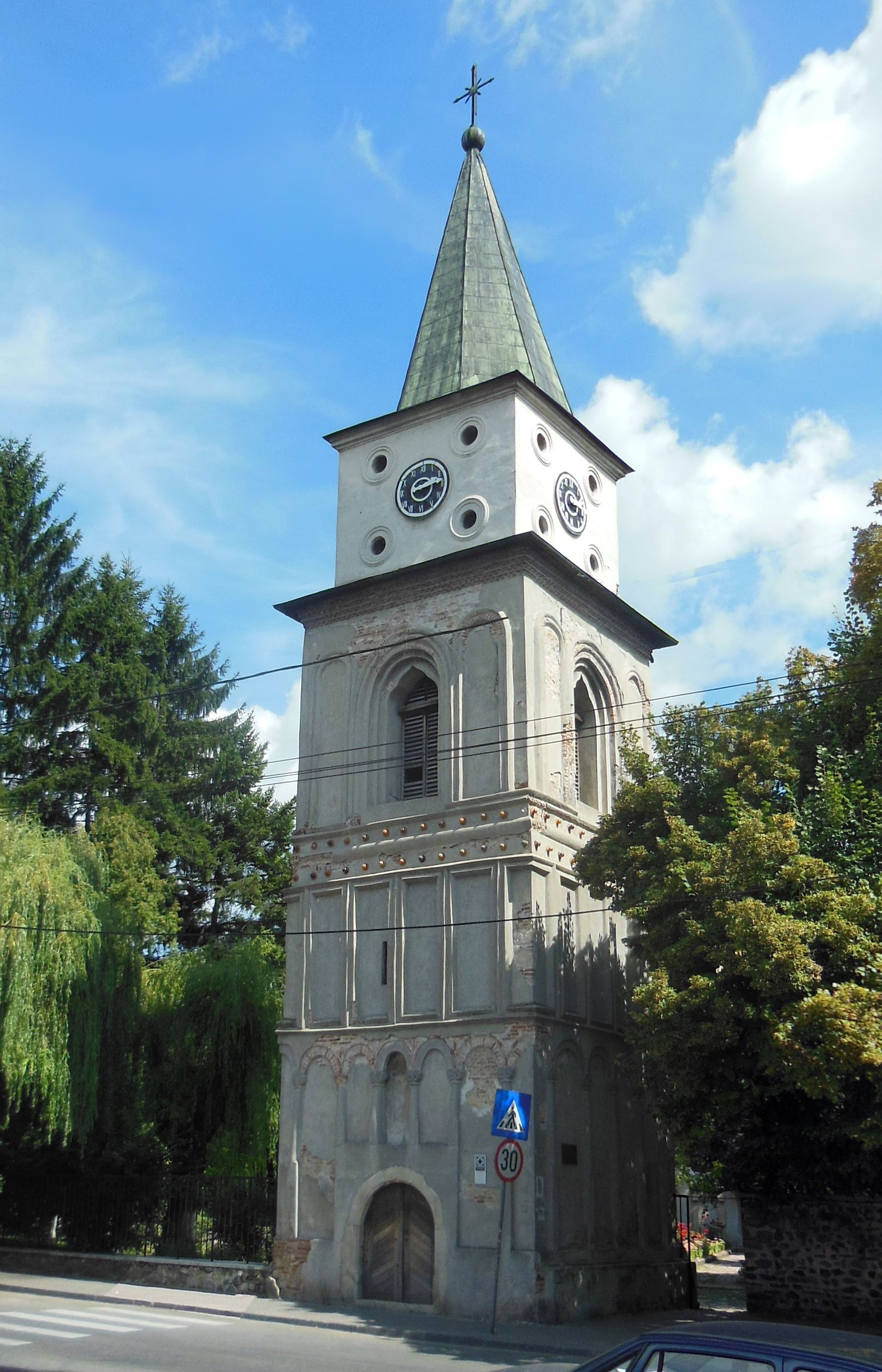 Turn clopotniță (1730), vedere din stradă, Câmpulung, Str. Negru Vodă 116, cod LMI AG-II-m-A-13554.05 05